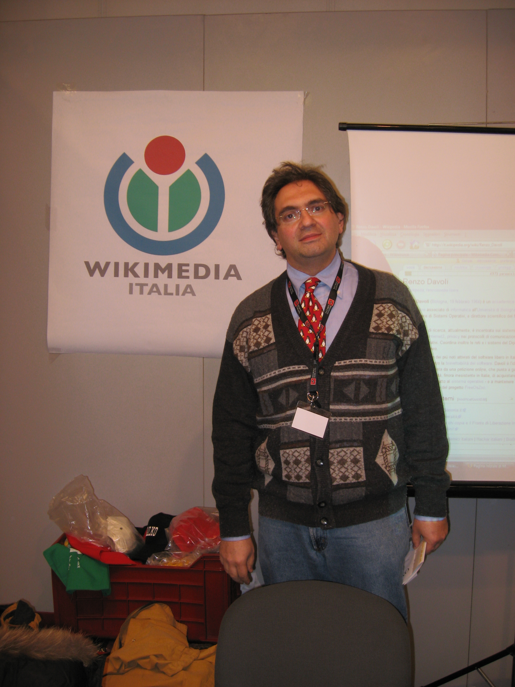 Renzo Davoli allo stand di Wikimedia Italia - Festival della CreativitÃ , Firenze 2007 fonte it.wikipedia autore Senpai licenza